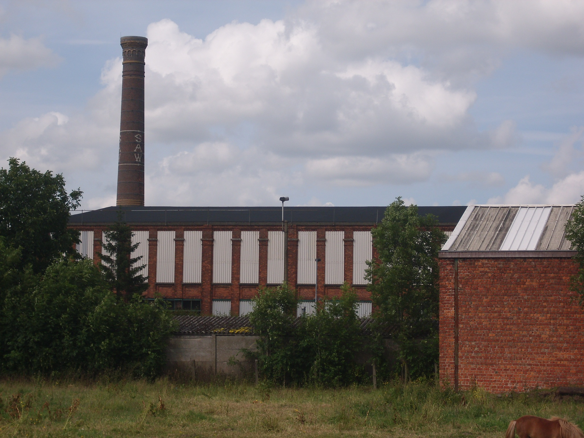 Société Anonyme de Waerschoot - Hoekje - Waarschoot - Oost-Vlaanderen - België